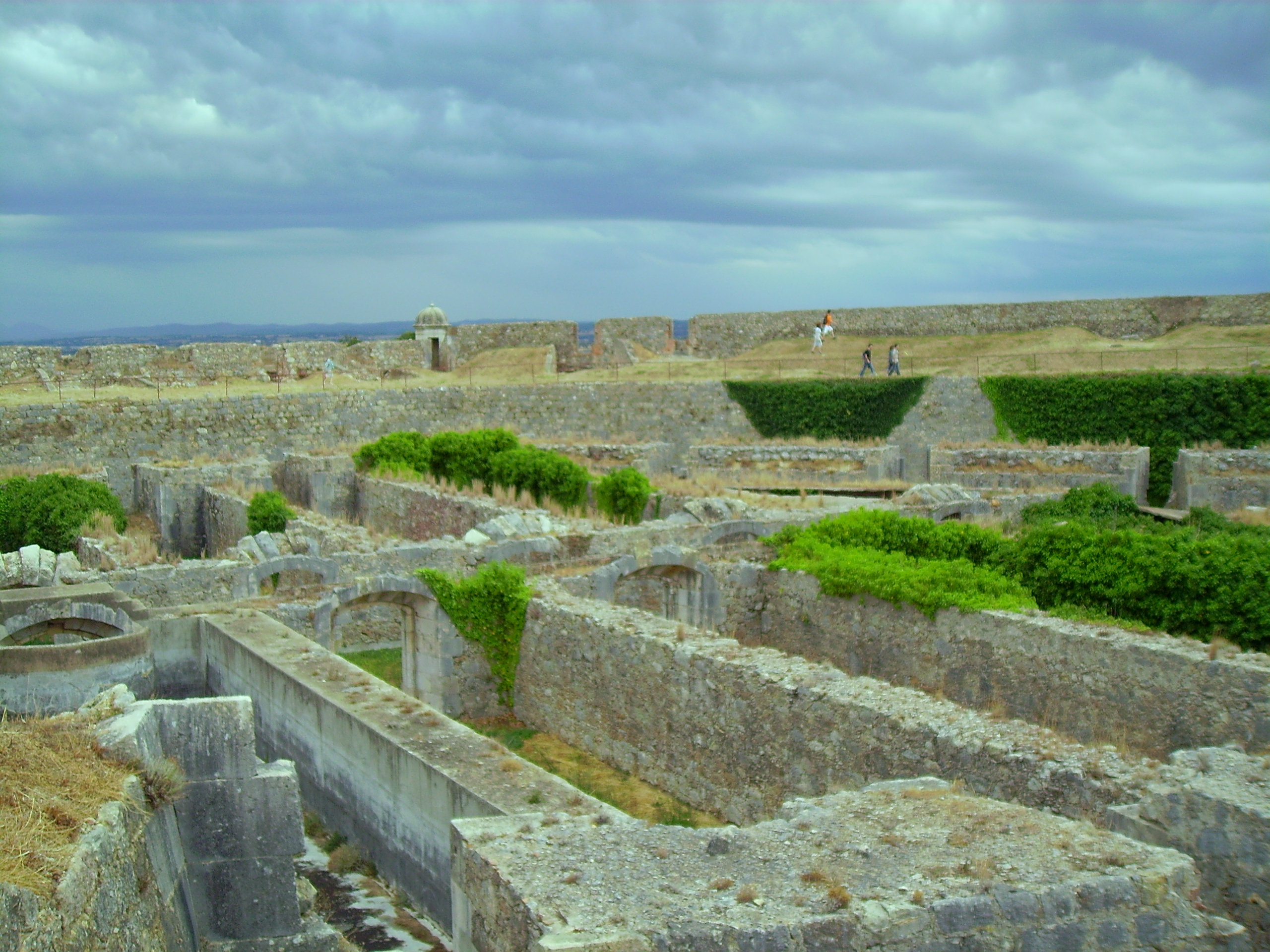 San Ferran Figueres's Castle, Catalunya, Spain.